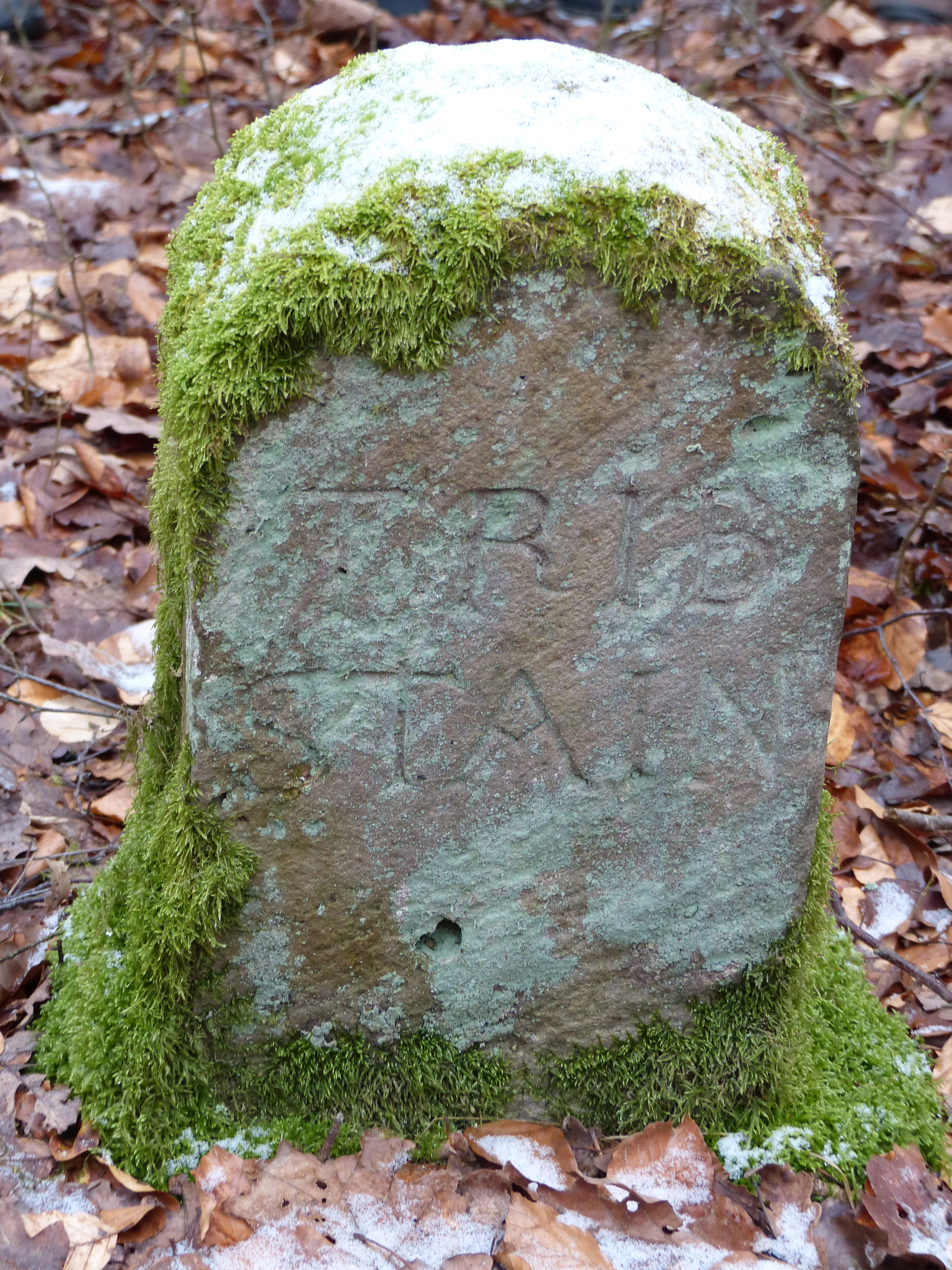 Reste eines spätmittelalterlichen Triebweges im Steigerwald, Grenzsteine und ausgetretener Weg